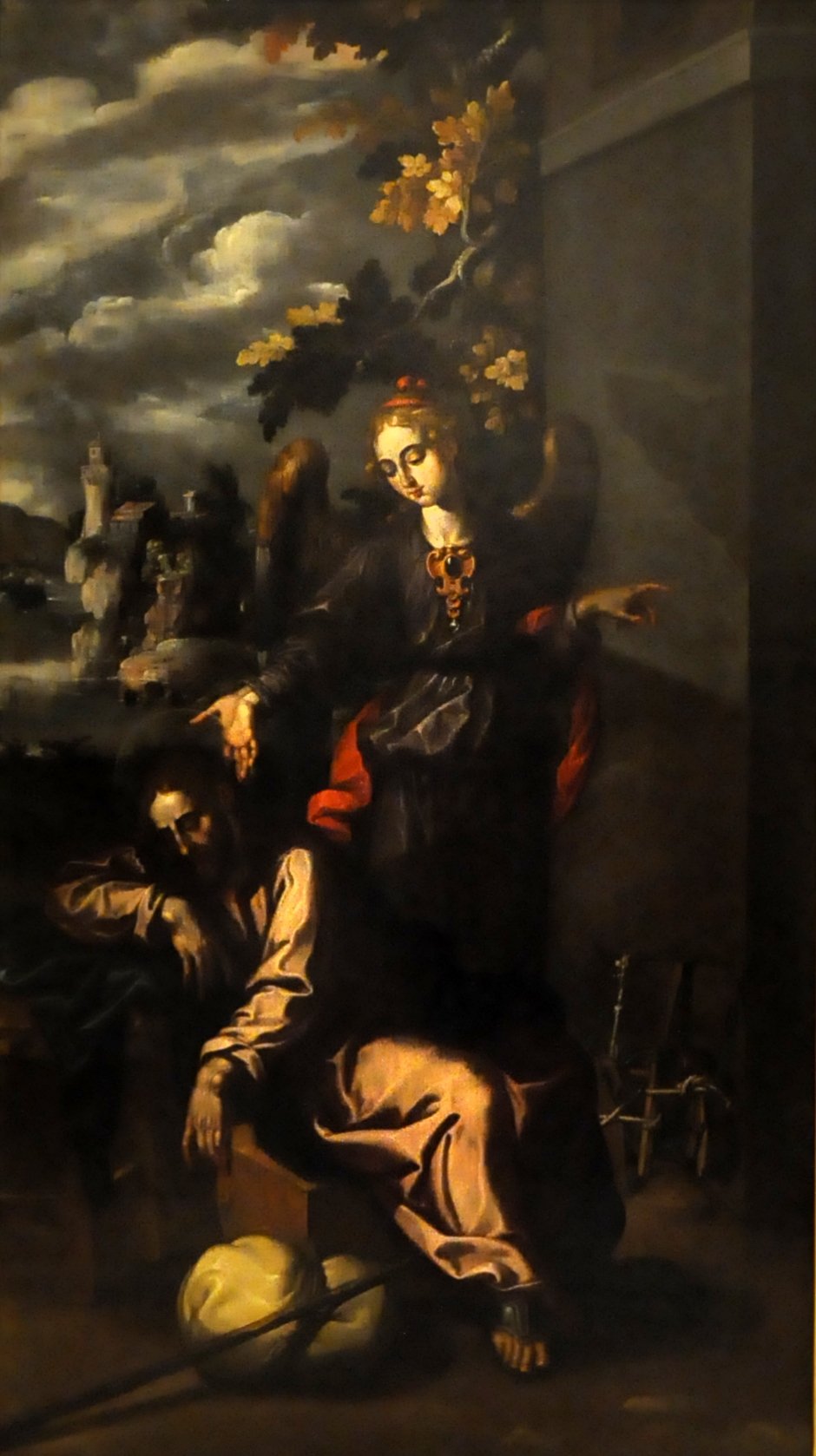 La obra representa el momento en que San José fue avisado mientras dormía de que huyera a Egipto con la Virgen María y el Niño Jesús para salvar a este último de ser asesinado por el rey Herodes el Grande.